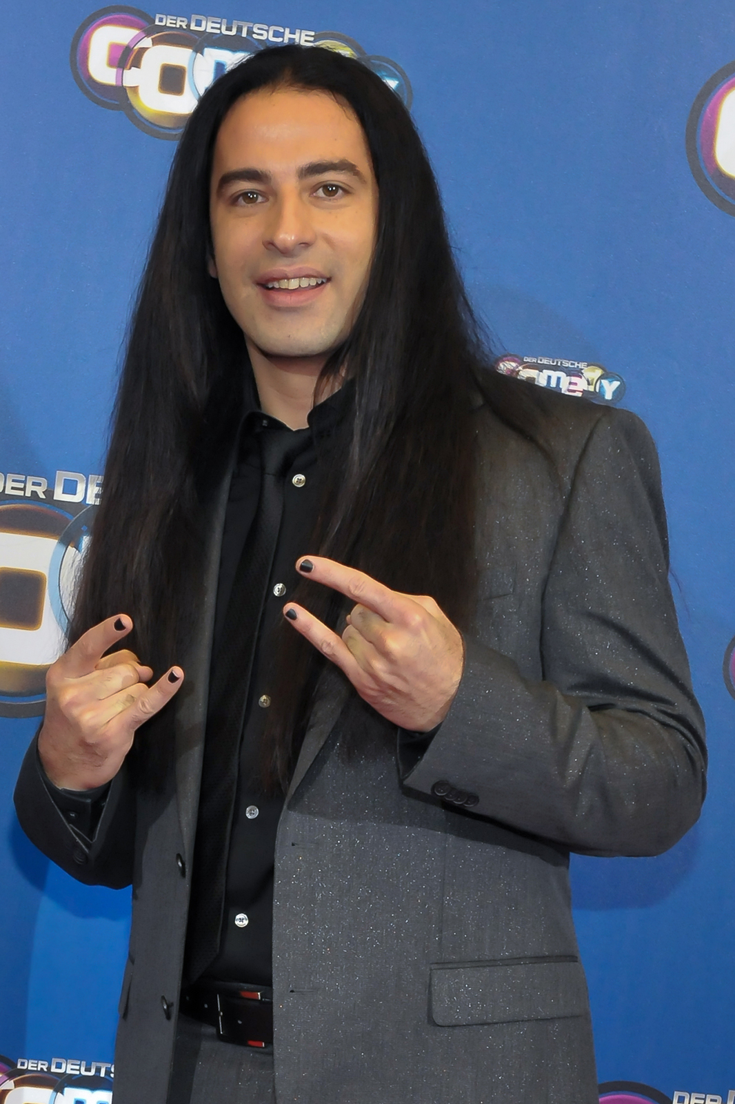 Bülent Ceylan auf dem Deutschen Comedypreis in Köln am 15. Oktober 2013.